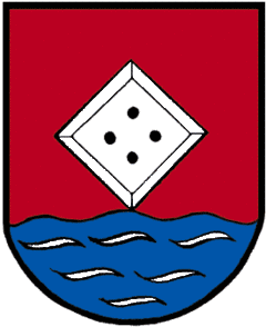 Wappen der Gemeinde Übelbach in Österreich